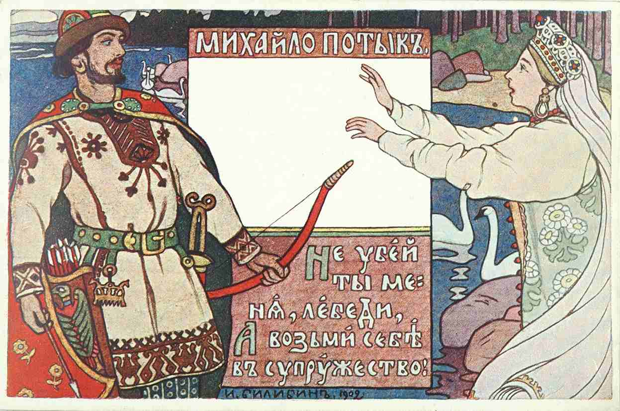 Михайло Потык (из серии "Богатыри") 1902. Открытка издания "Общины св. Евгении". №213. Из коллекции Э.Б. Файнштейна